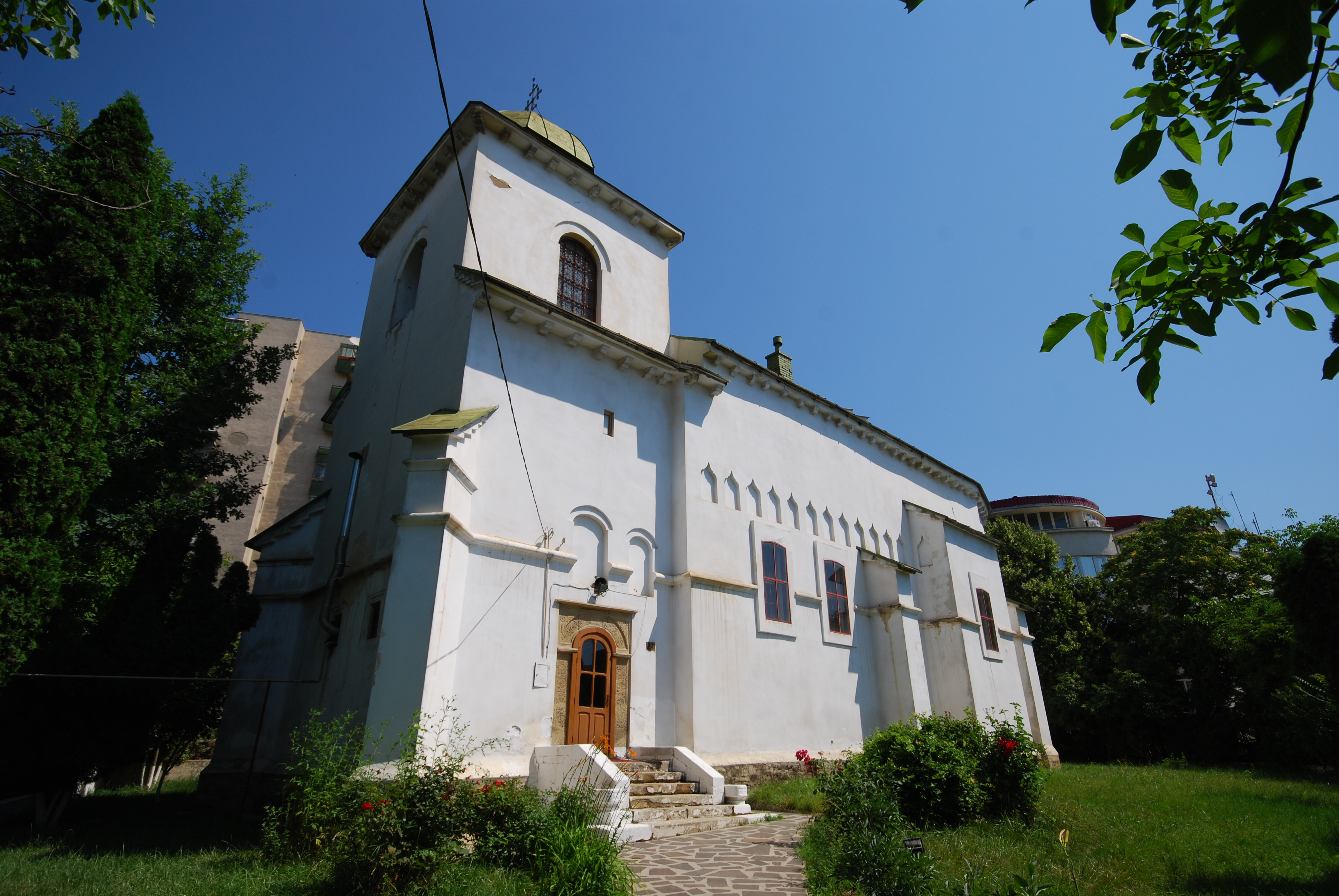 Biserica "Intrarea în Biserică" - Vovidenia